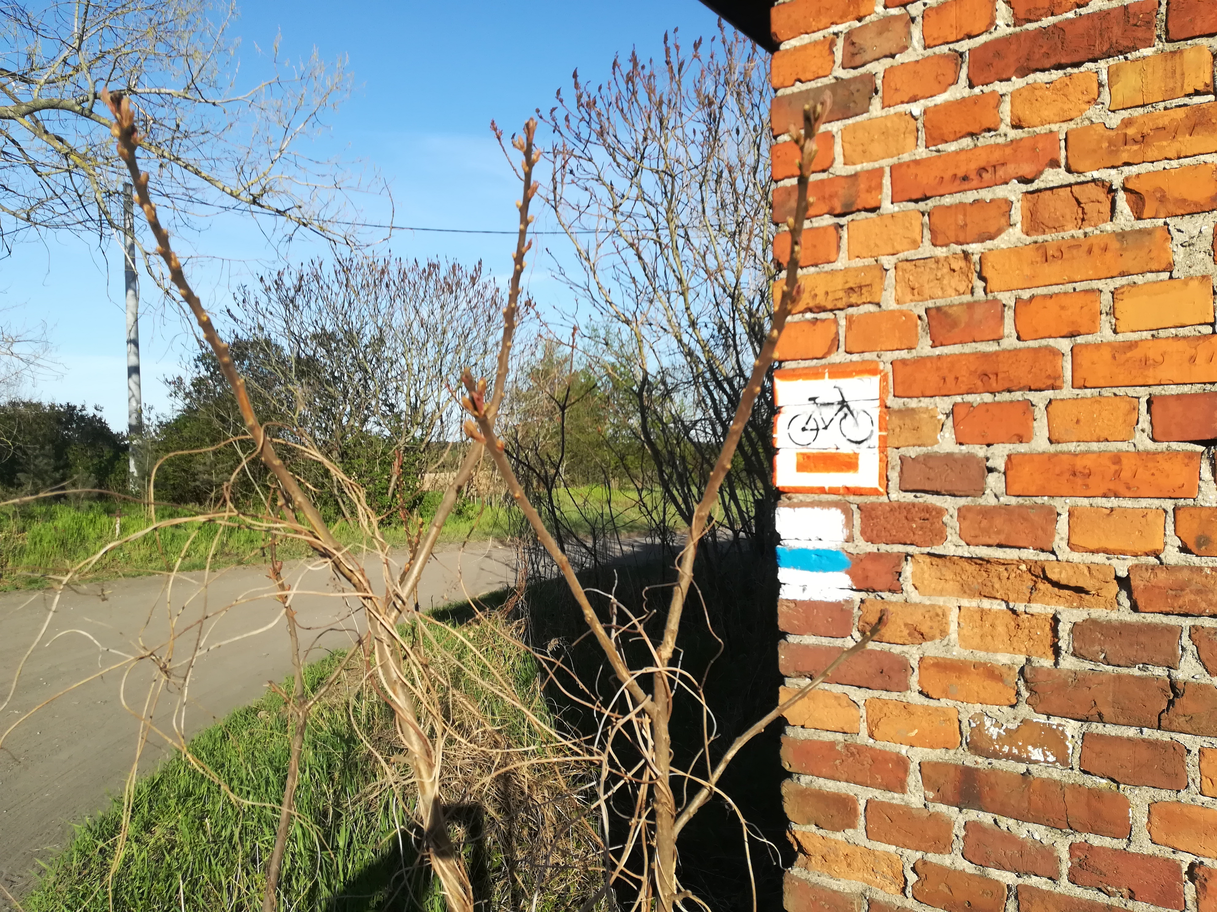 Osada Górka w Wielkopolskim parku Narodowym.